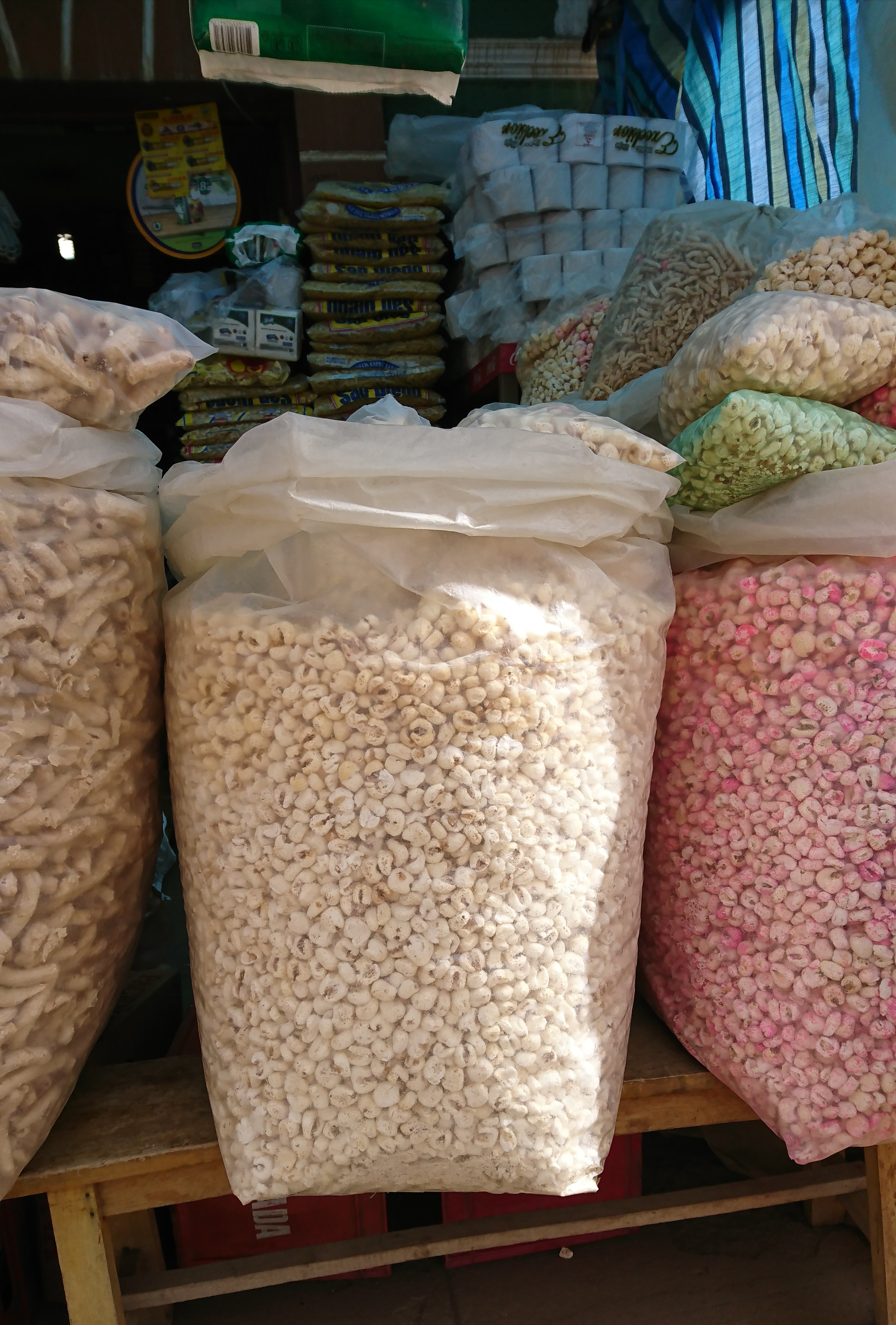 saco de pasankalla en tienda